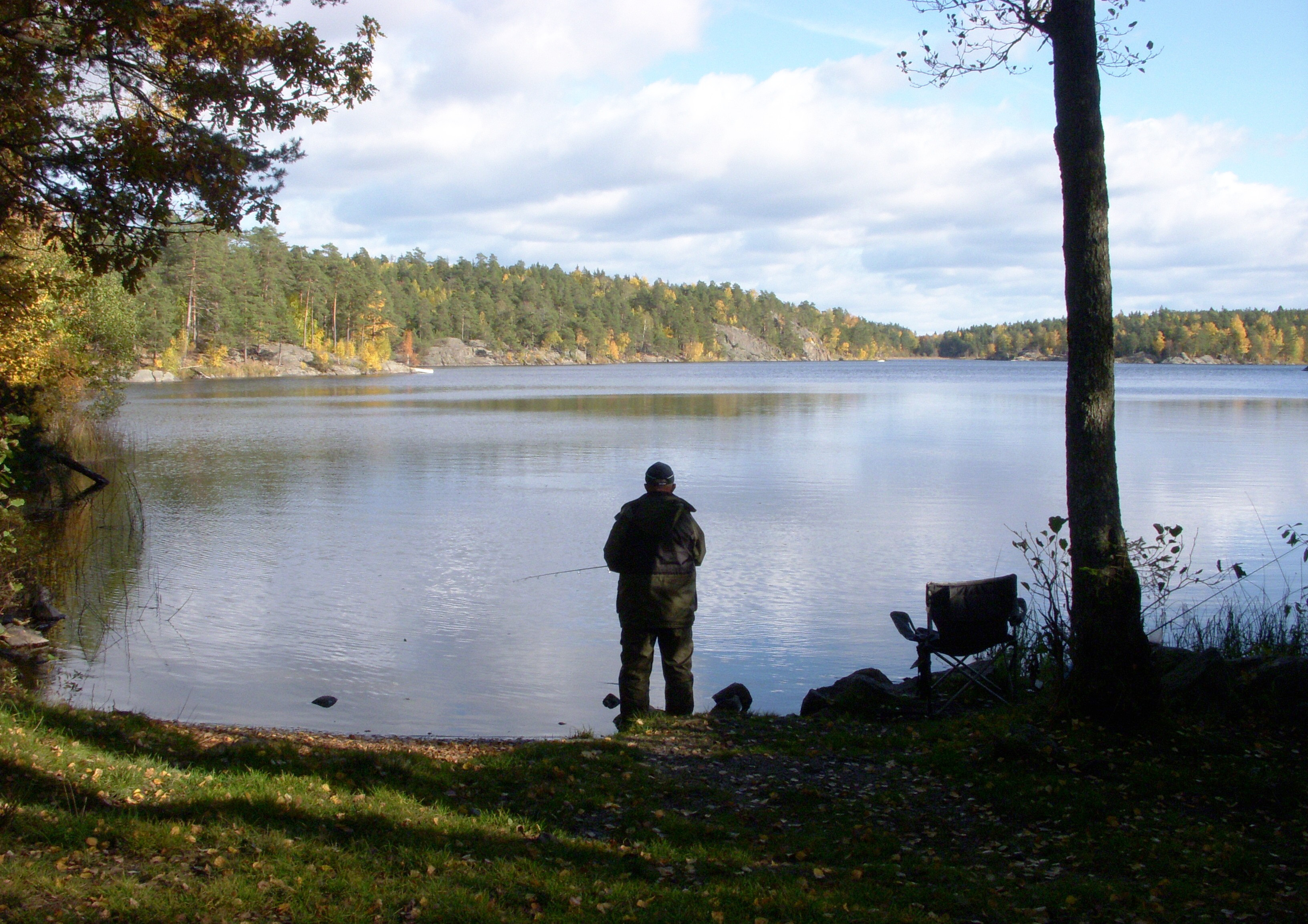 Gömmaren, vy mot öst